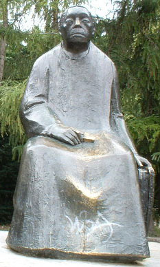 Gustav Seitz: Käthe Kollwitz-Denkmal 1958, Bronze, 210 cm; Werkvereichnis Grohn Nr. 127. Berlin: Käthe-Kollwitz-Platz (→ 1960).